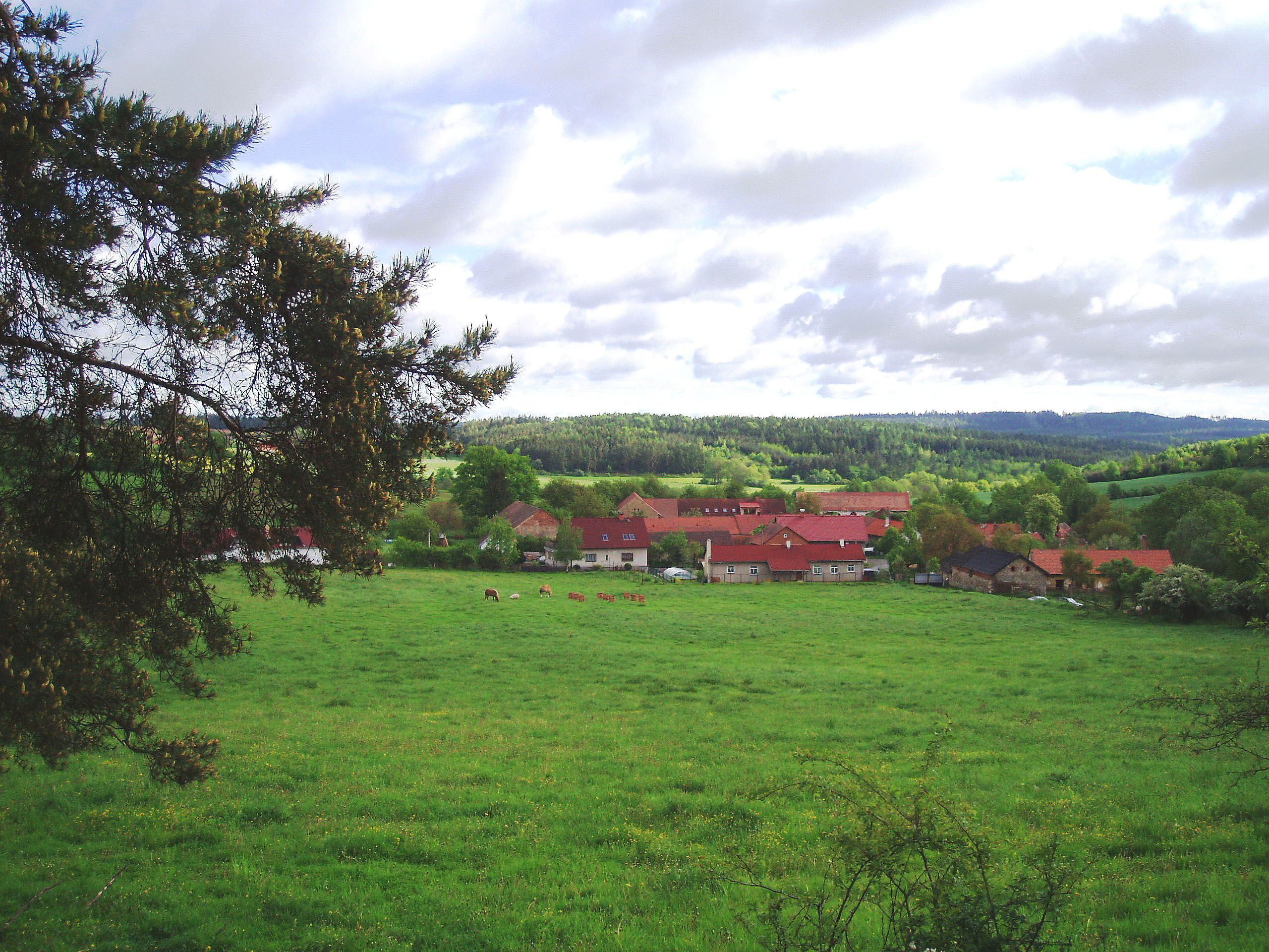 Pečičky - celkový pohled